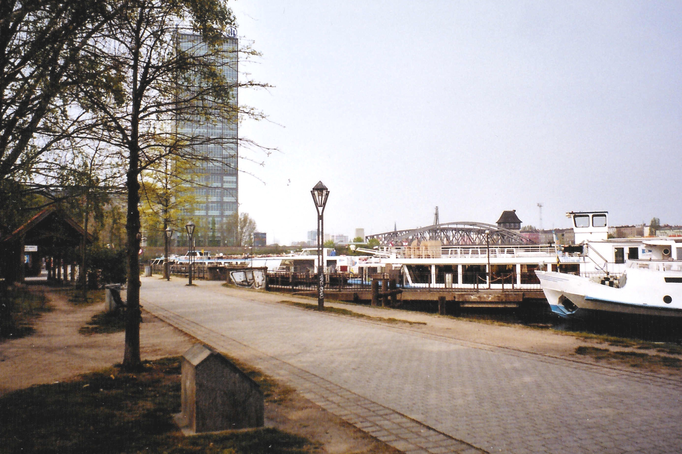 Der Treptower Hafen in Blickrichtung Elsenbrücke. Im Vordergrund der Gedenkstein für die Opfer des Schiffsunglücks vom 5. Juli 1951.